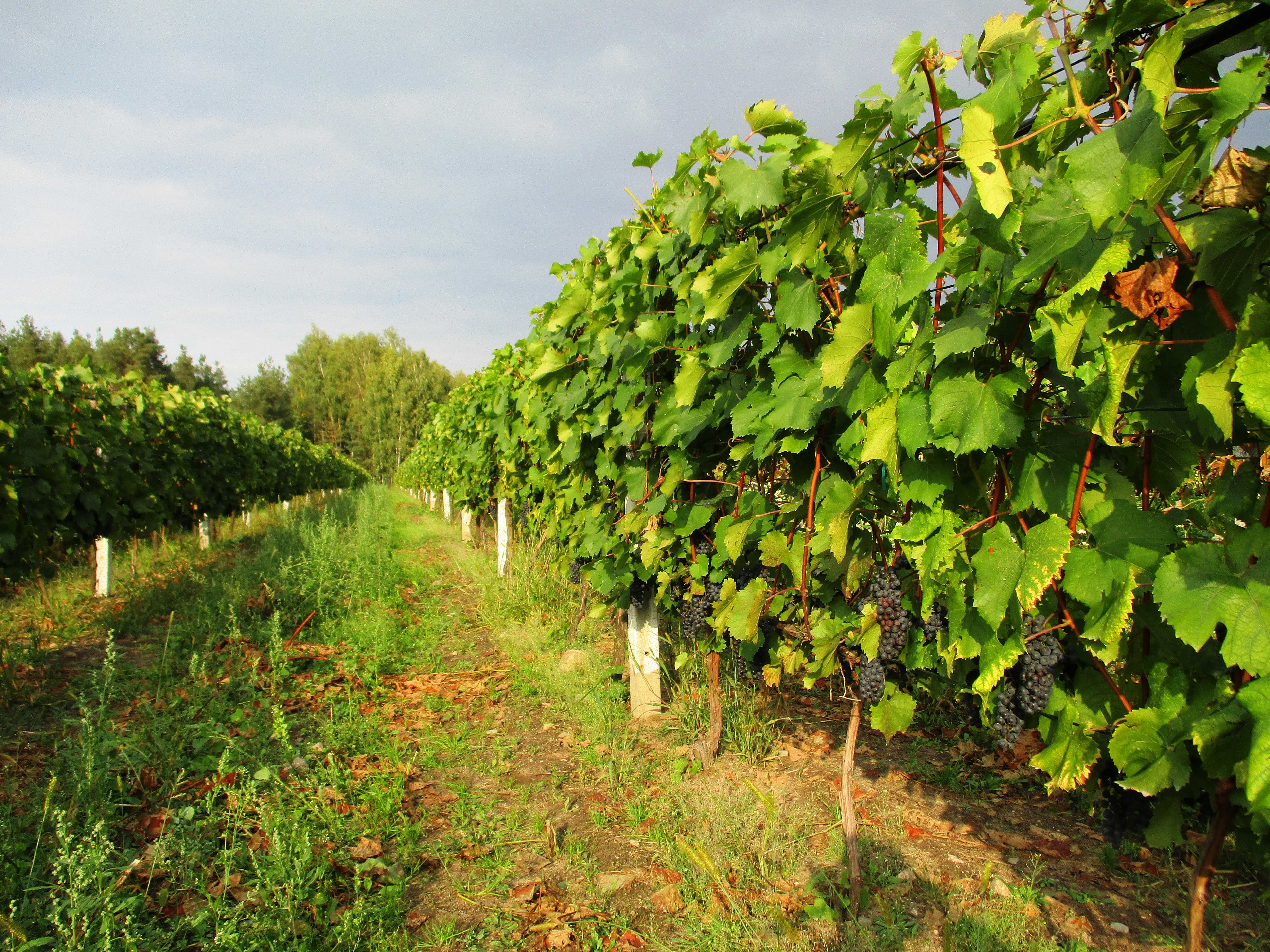 Winnica Dwórzno, gmina Mszczonów